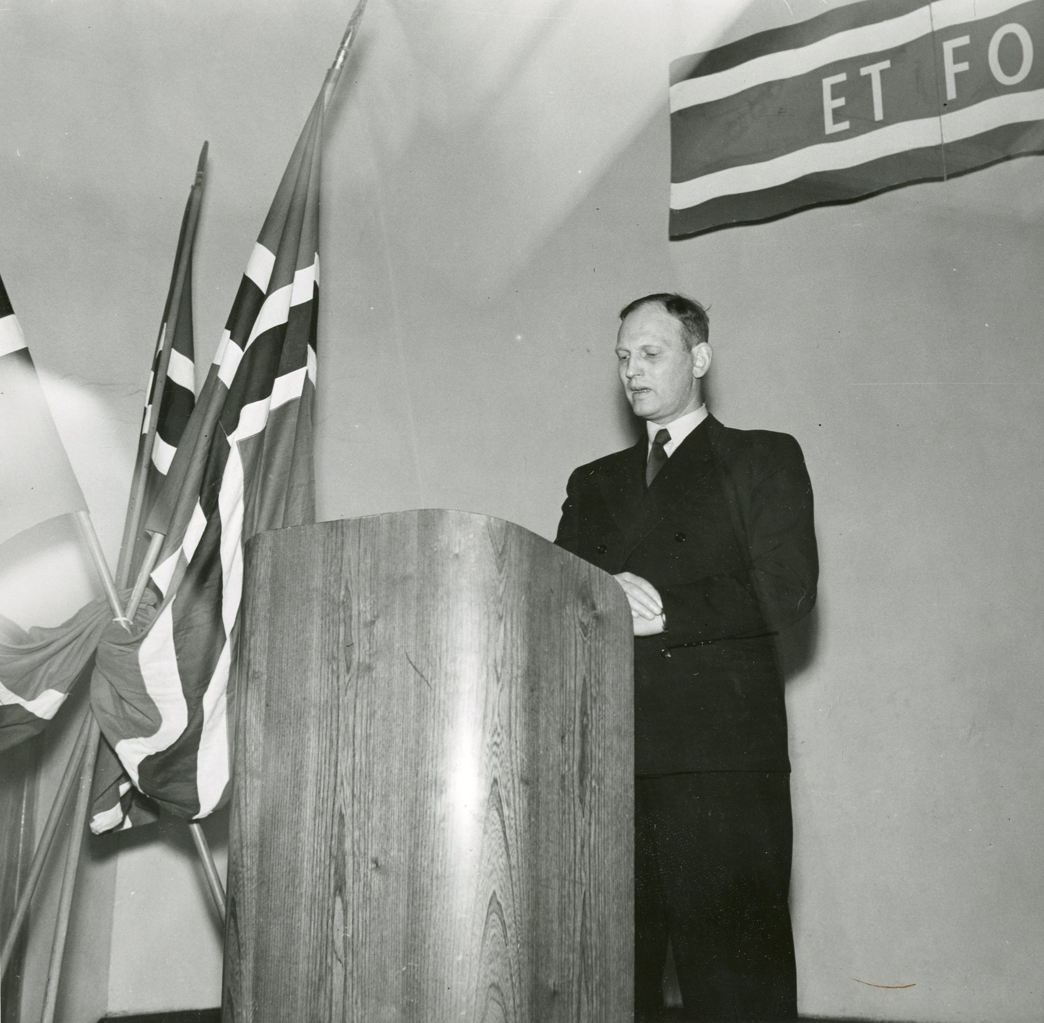 Fra norgesmøtet i Medborgarhuset 2/3-44. Flyktningesjefen Helset taler. RA/PA-1209/Uc/66/2/S 5007